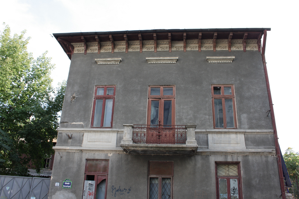 Casă, Str. Sevastopol 32 sector 1